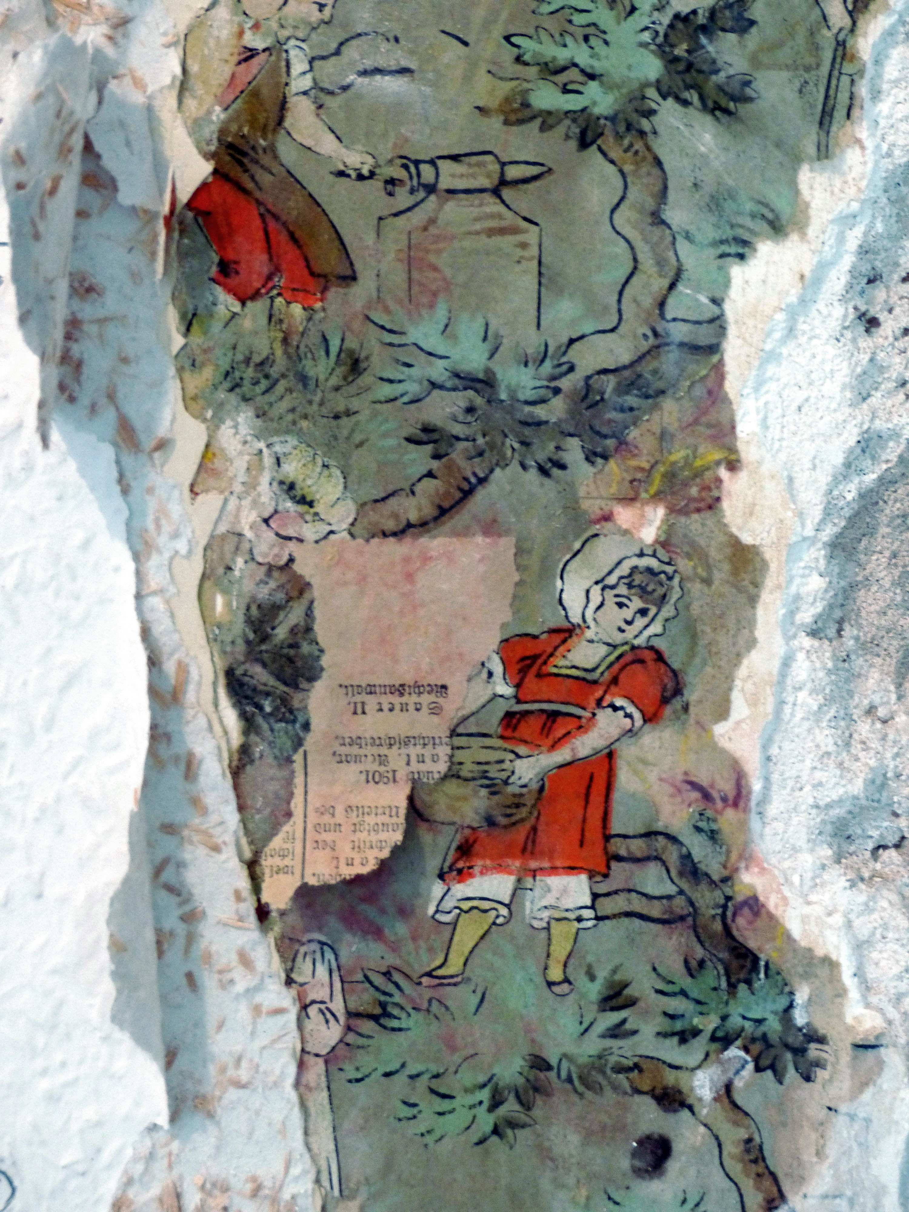 Wohnhaus, Theresienstr. 36, Tapetenrest 1895, übertapeziert 1901This is a photograph of an architectural monument.